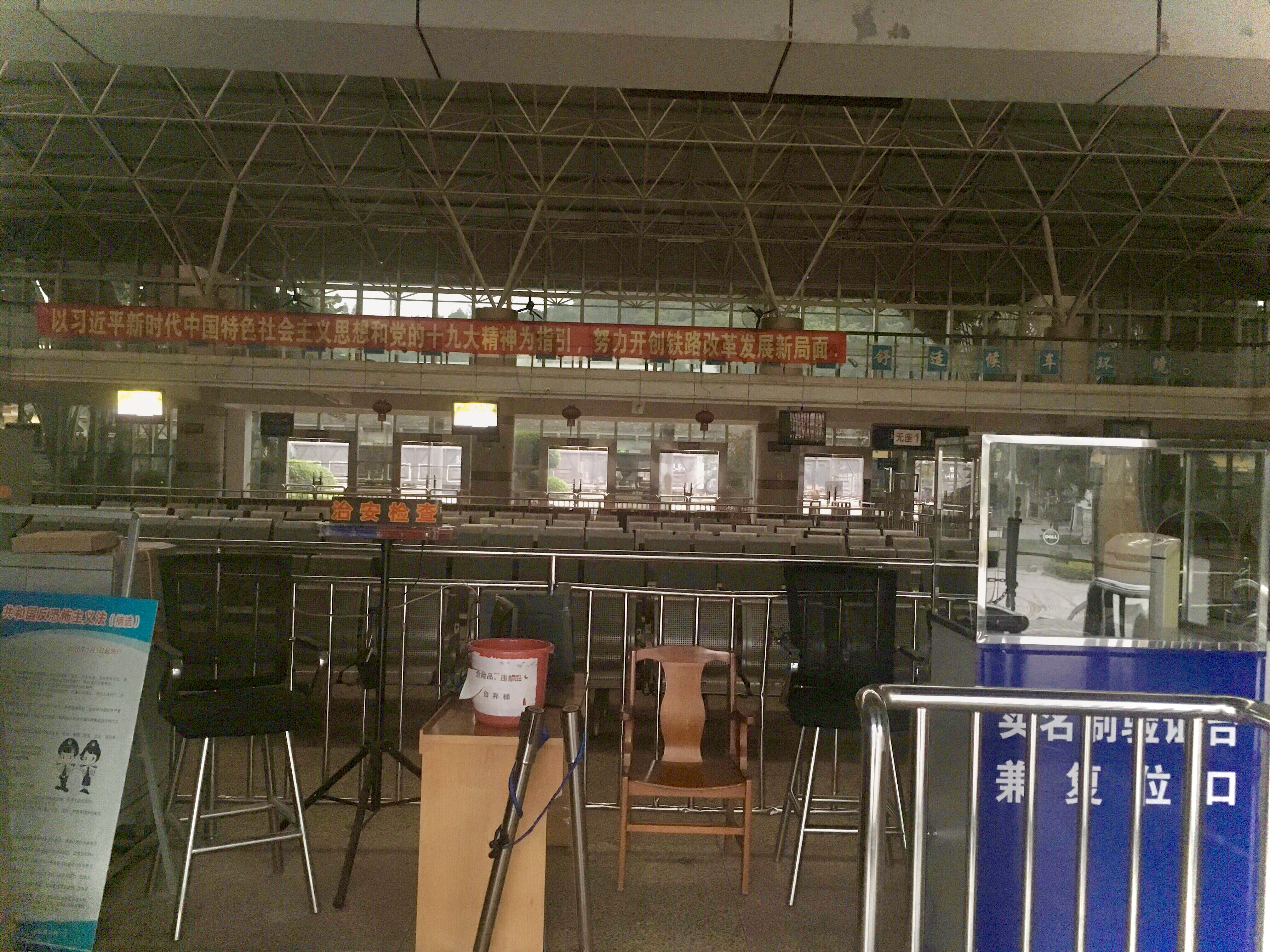 20190104最后一趟列车开出后的漳州东站候车室